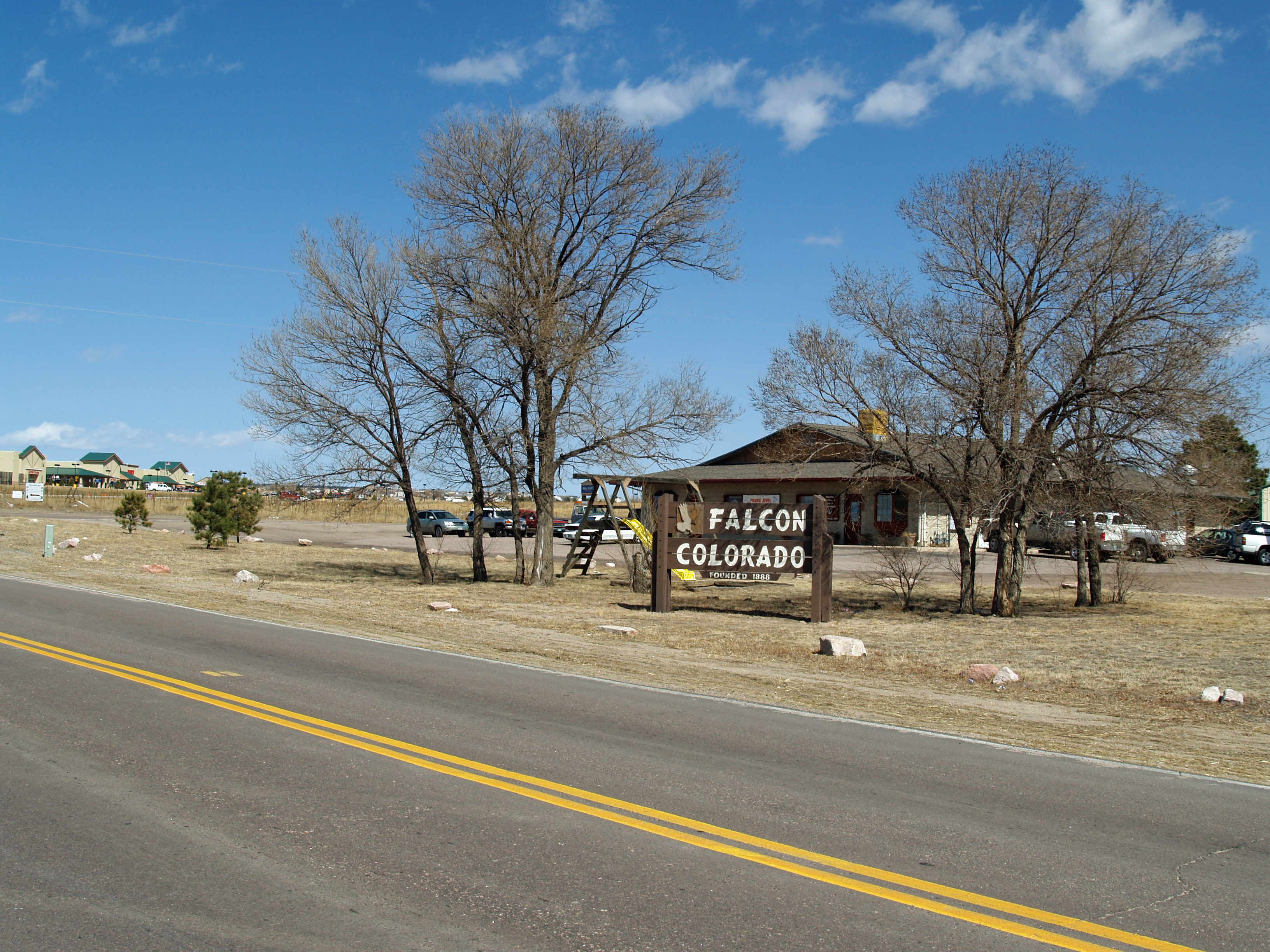 Falcon, Colorado sign.